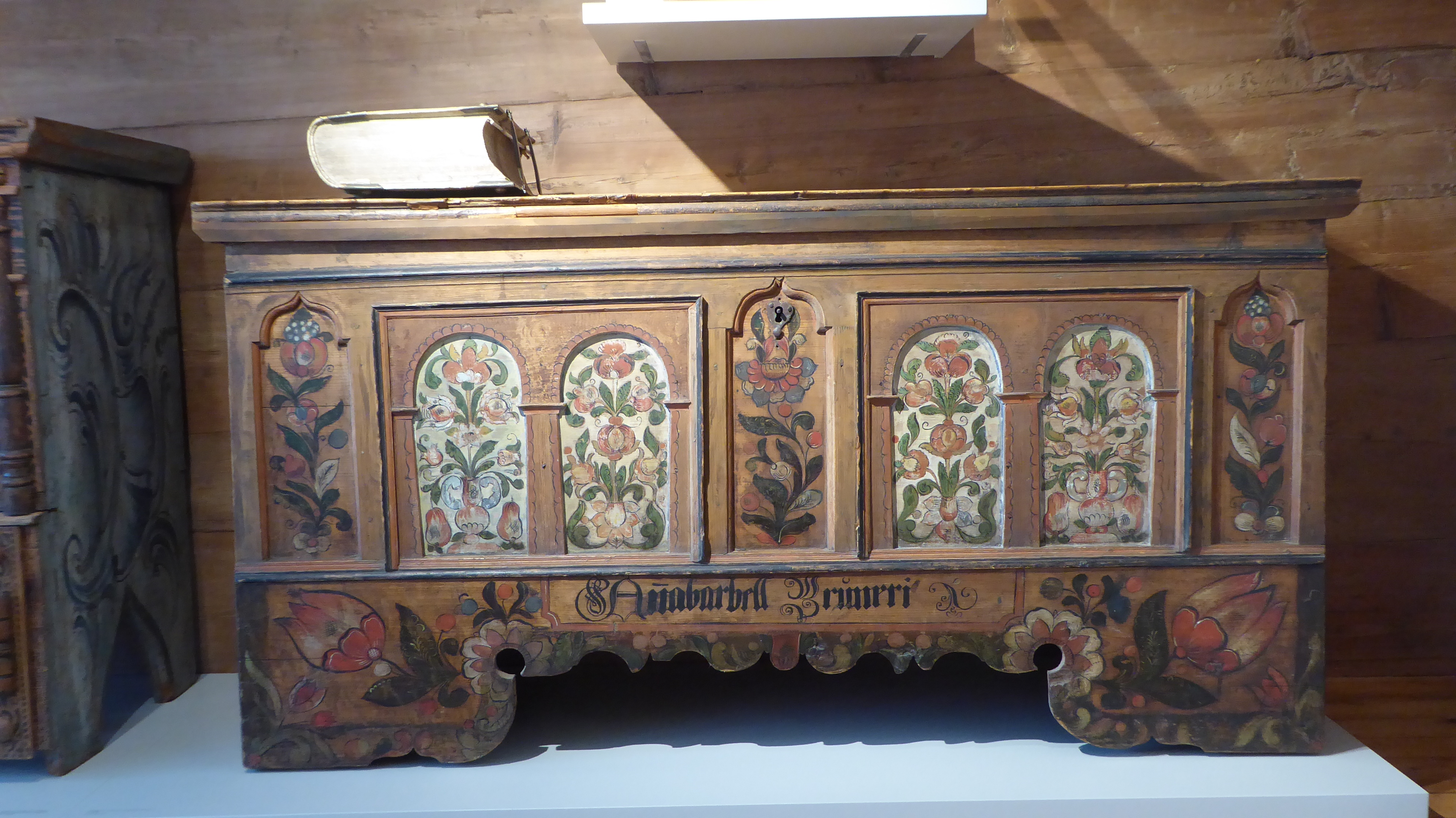 Truhe für «Anabarbell Bruneri» eines unbekannten Malers, um 1740